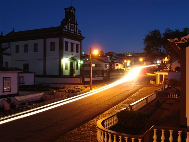 Igreja de Santa Bárbara da Fonte do Bastardo, noite, ilha Terceira, Açores, Portugal